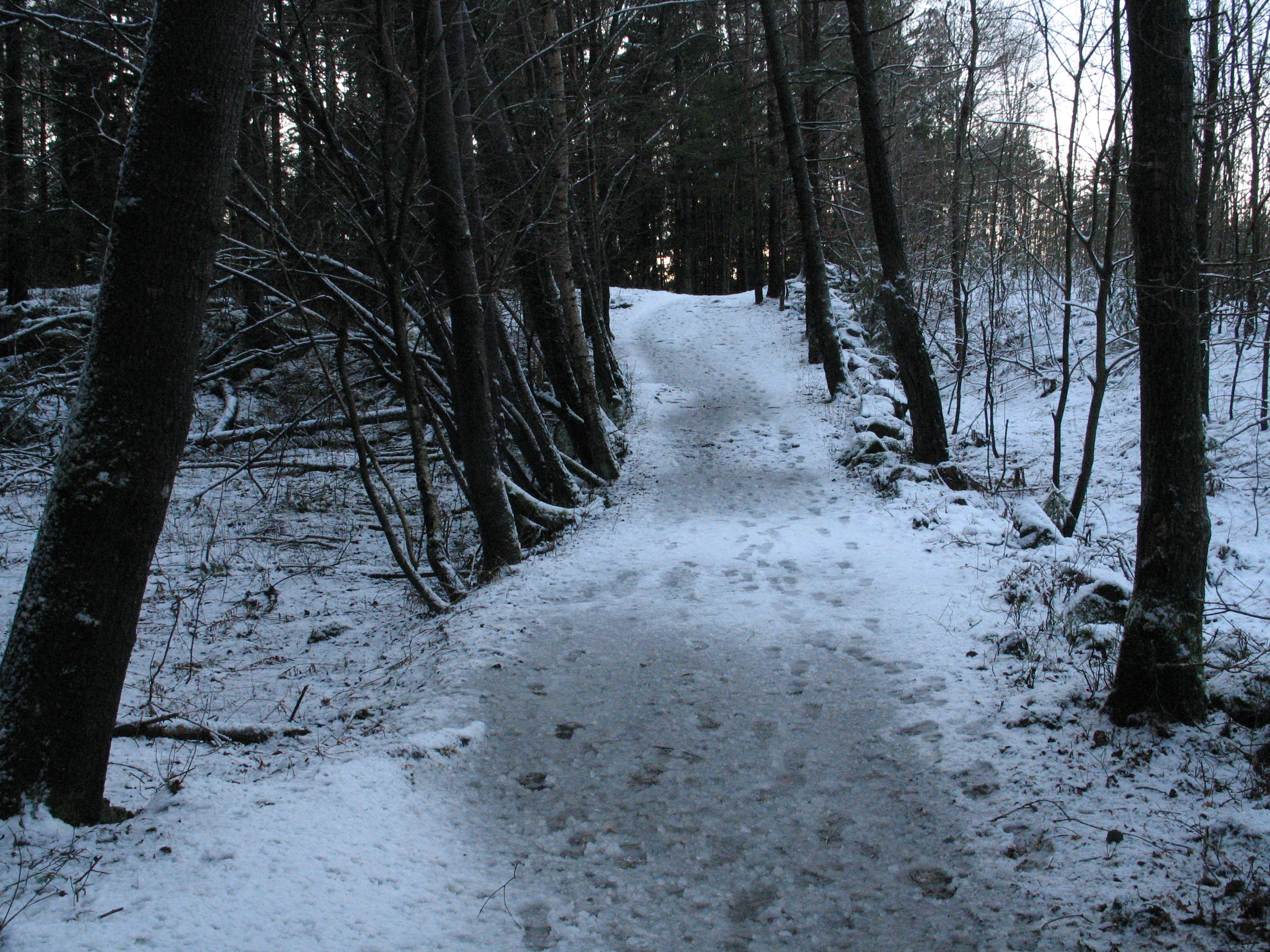 Gammel vei mellom Solborg og Stoa i Arendal, tidligere i Øyestad kommune. Her gikk Vestlandske hovedvei.